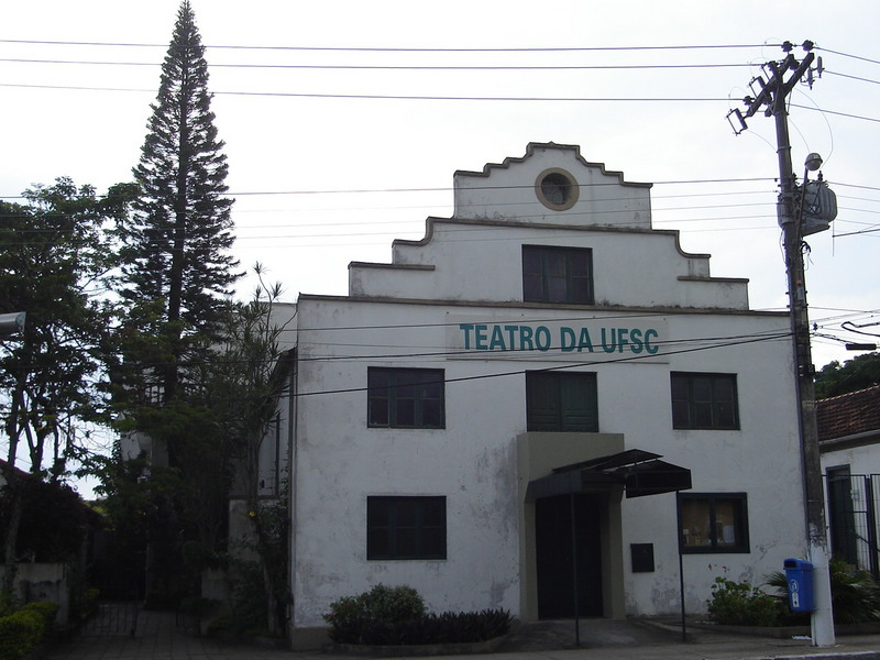 O Teatro da UFSC, em Florianópolis.